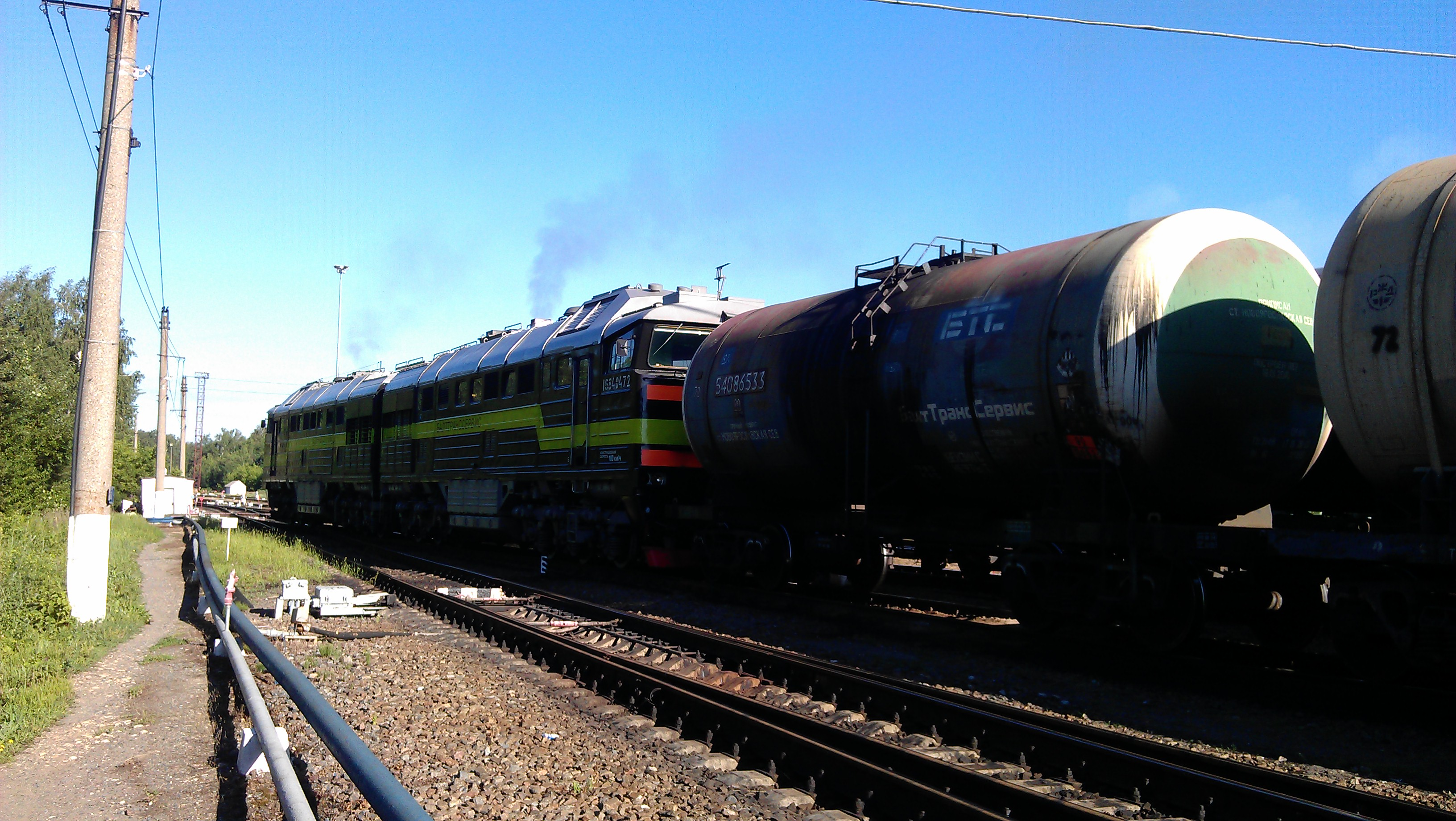 Cостав цистерн с нефтепродуктами стартует со станции Стенькино-2 (Рязанская область).